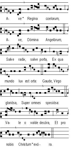 Ave, Regína cœlórum